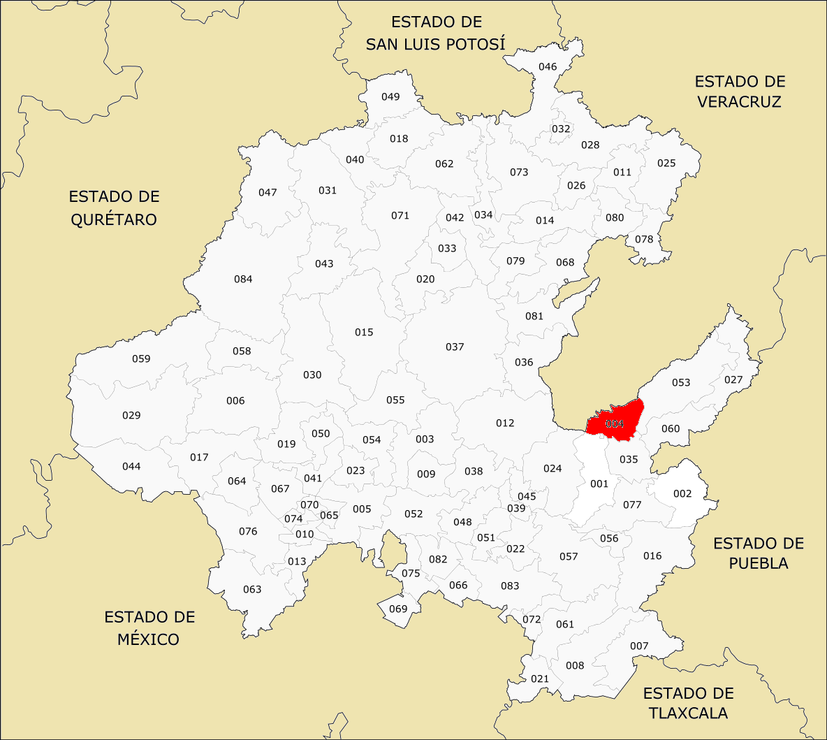 004 Municipios de Hidalgo